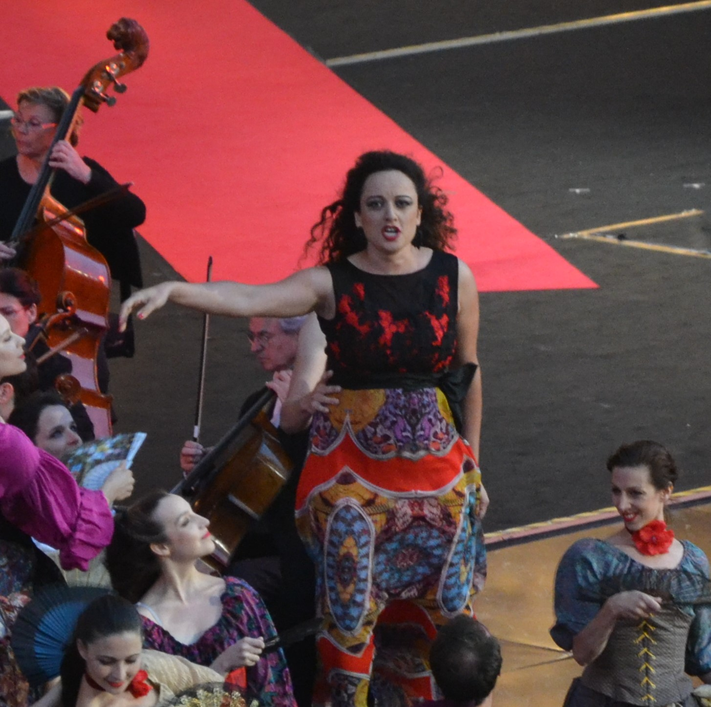 Dans un extrait de Carmen, lors de Musique en fête 2015 à Orange